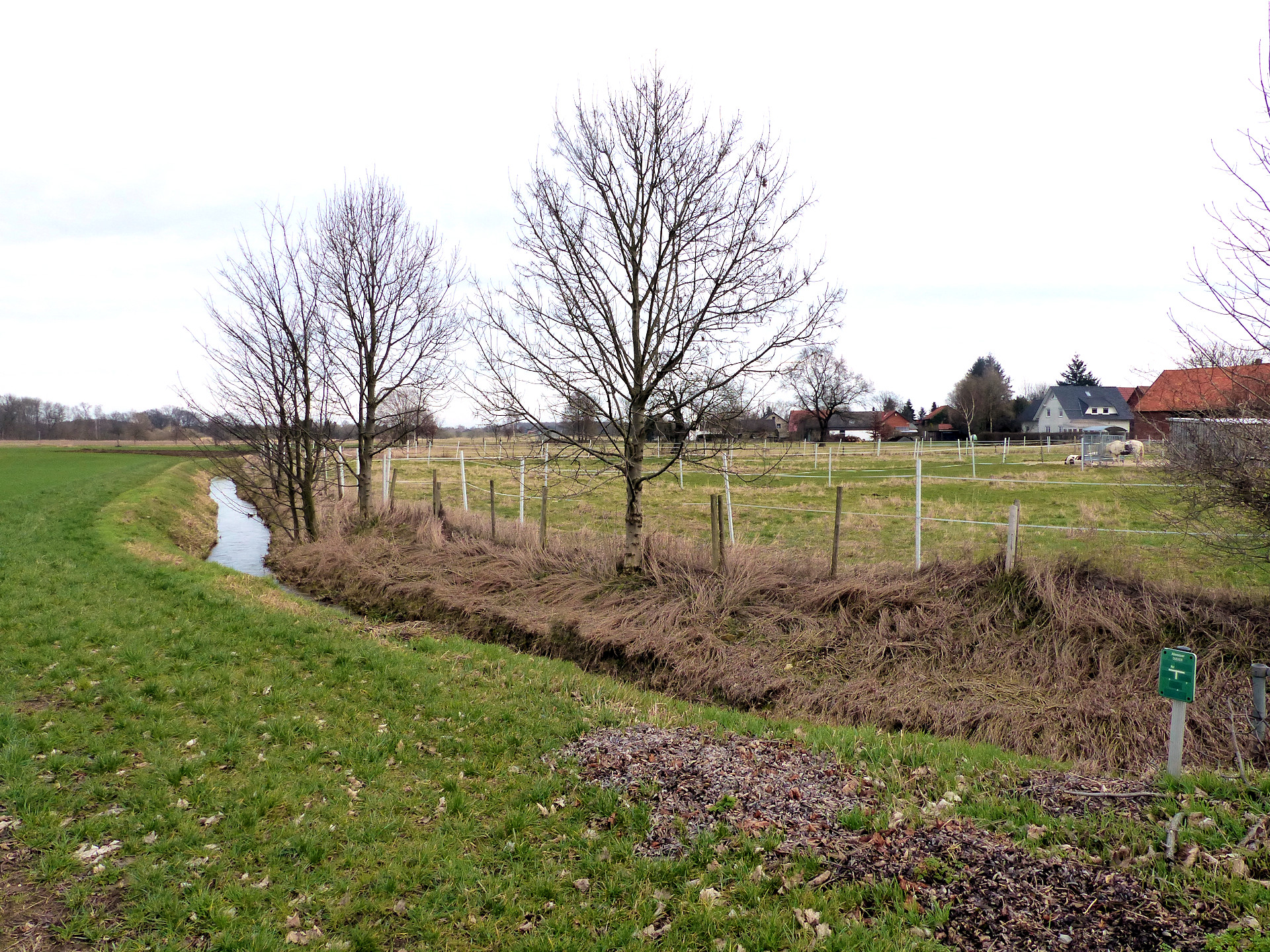 Die Scheppau bei ihrem nördlichen Umlauf um den Ort Scheppau (Königslutter am Elm), Blickrichtung Nordwesten stromabwärts.